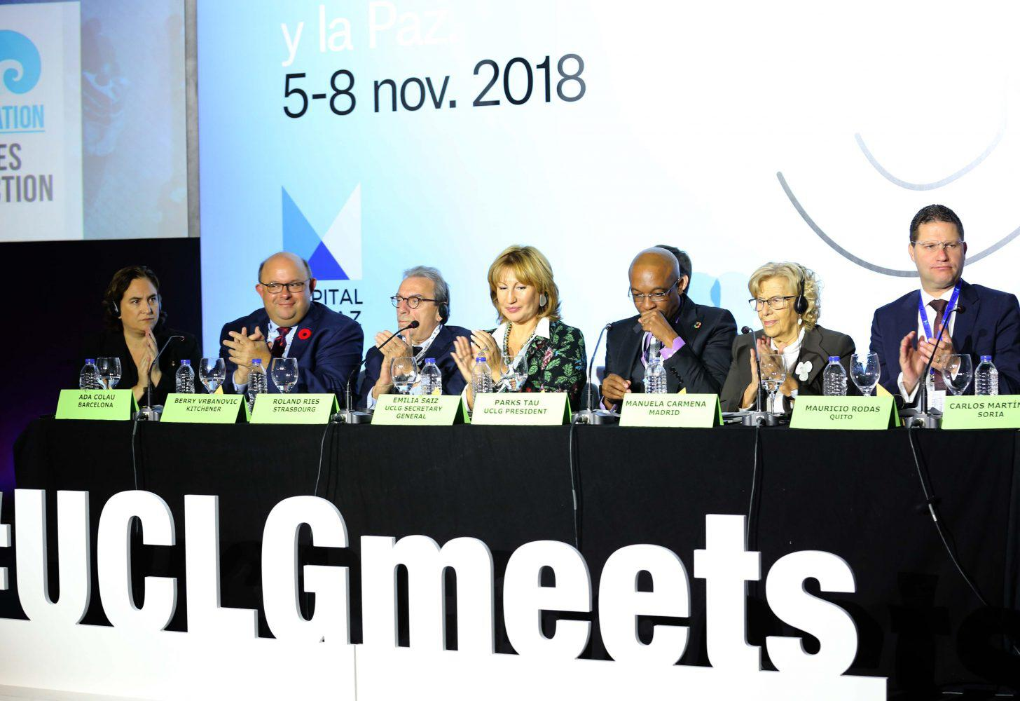 “El desarrollo urbano tiene que estar encaminado al pleno desarrollo de todos y cada uno de sus habitantes”. Con esa afirmación la alcaldesa de Madrid, Manuela Carmena, hacía un llamamiento a la alianza de las ciudades del mundo para luchar codo con codo contra las violencias que las aquejan. Lo hizo en la inauguración del Bureau Ejecutivo de Ciudades y Gobiernos Locales Unidos (CGLU) la mayor organización municipalista del mundo, presidida por el sudafricano Mpho Franklyn Parks Tau y que ha traído a Madrid a cerca de 300 alcaldes y representantes municipales de todos los puntos del planeta.